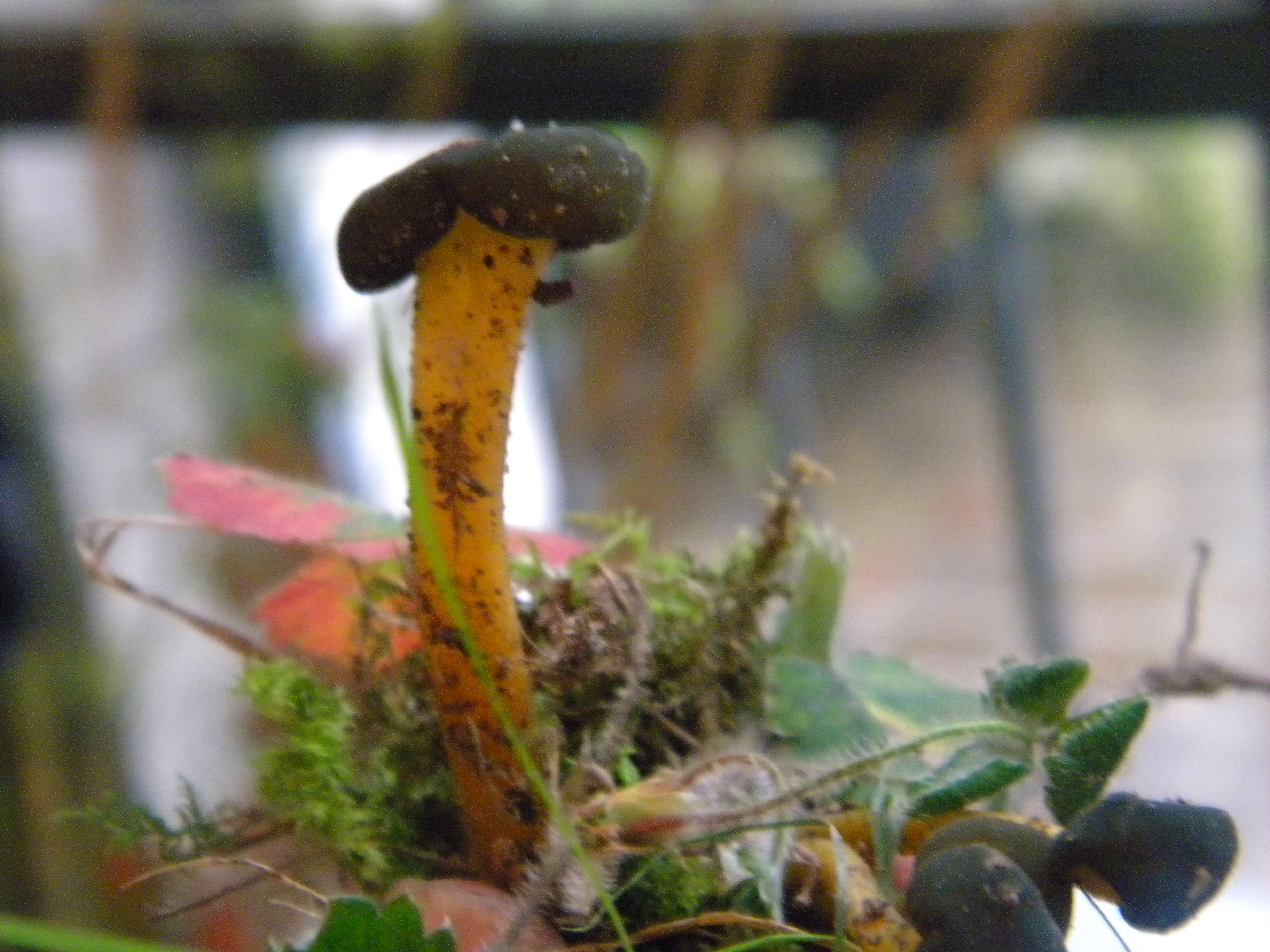 Leotia viscosa exposition de la société d'histoire naturelle de Givry (71)